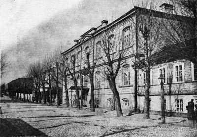 Мариинская женская гимназия на Подгорной улице.